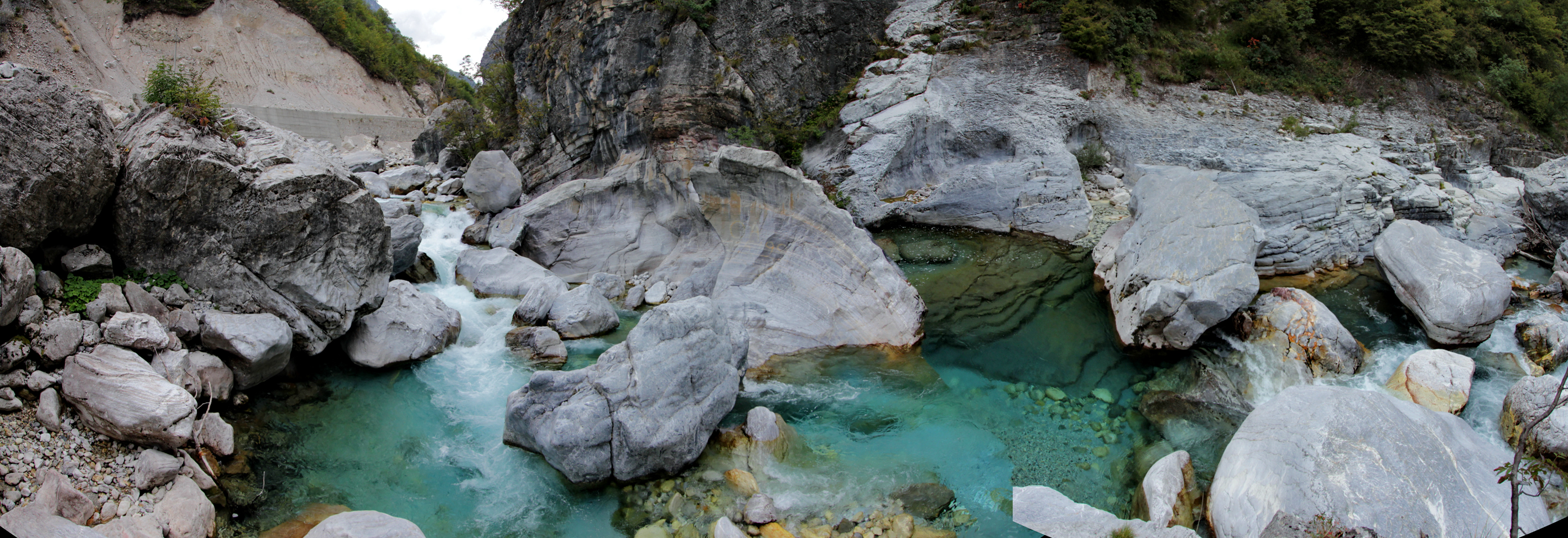 Struktura antiklinale Këlcyrë - Valbonë